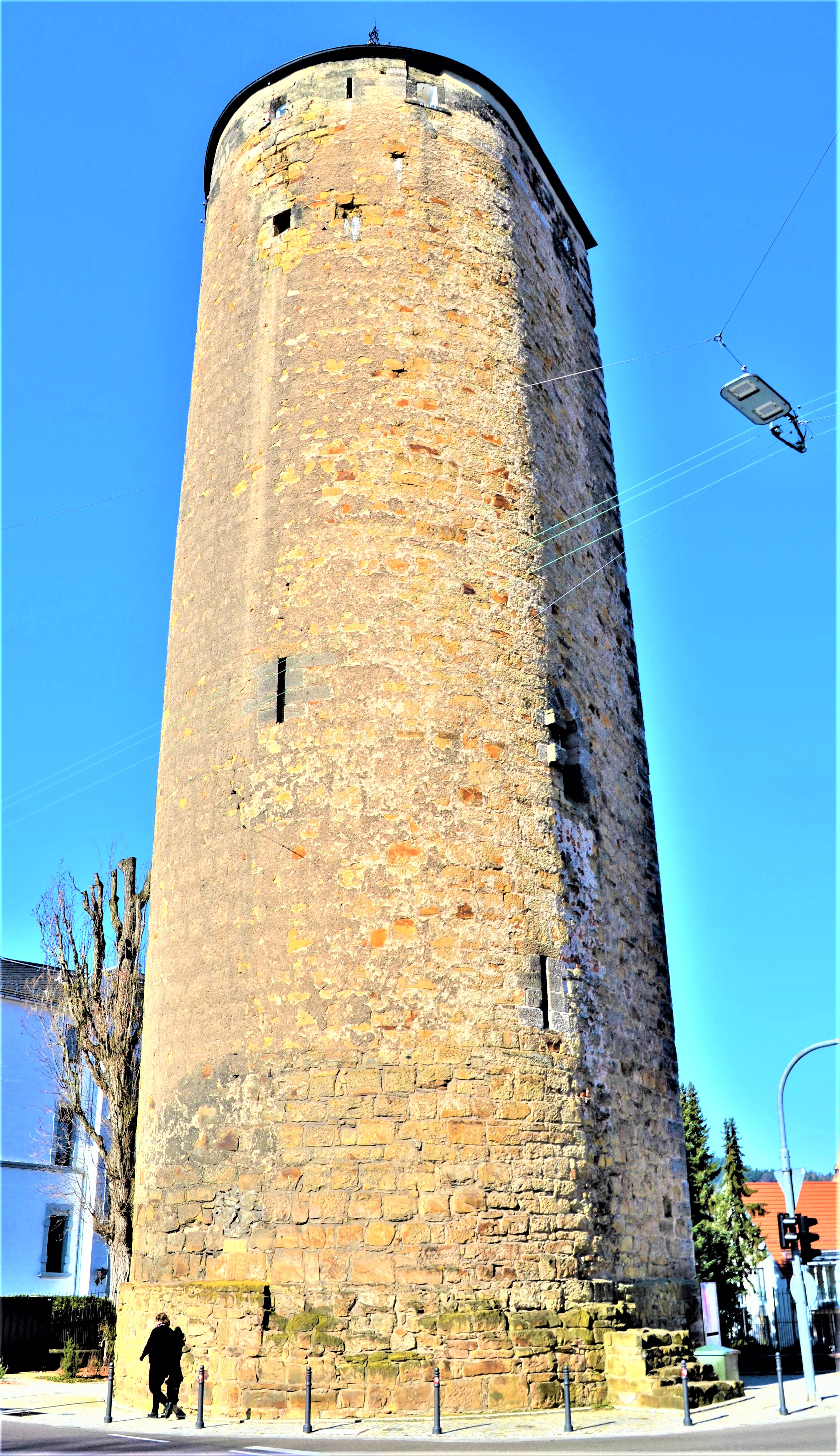 Königsturm in Schwäbisch Gmünd von Südost